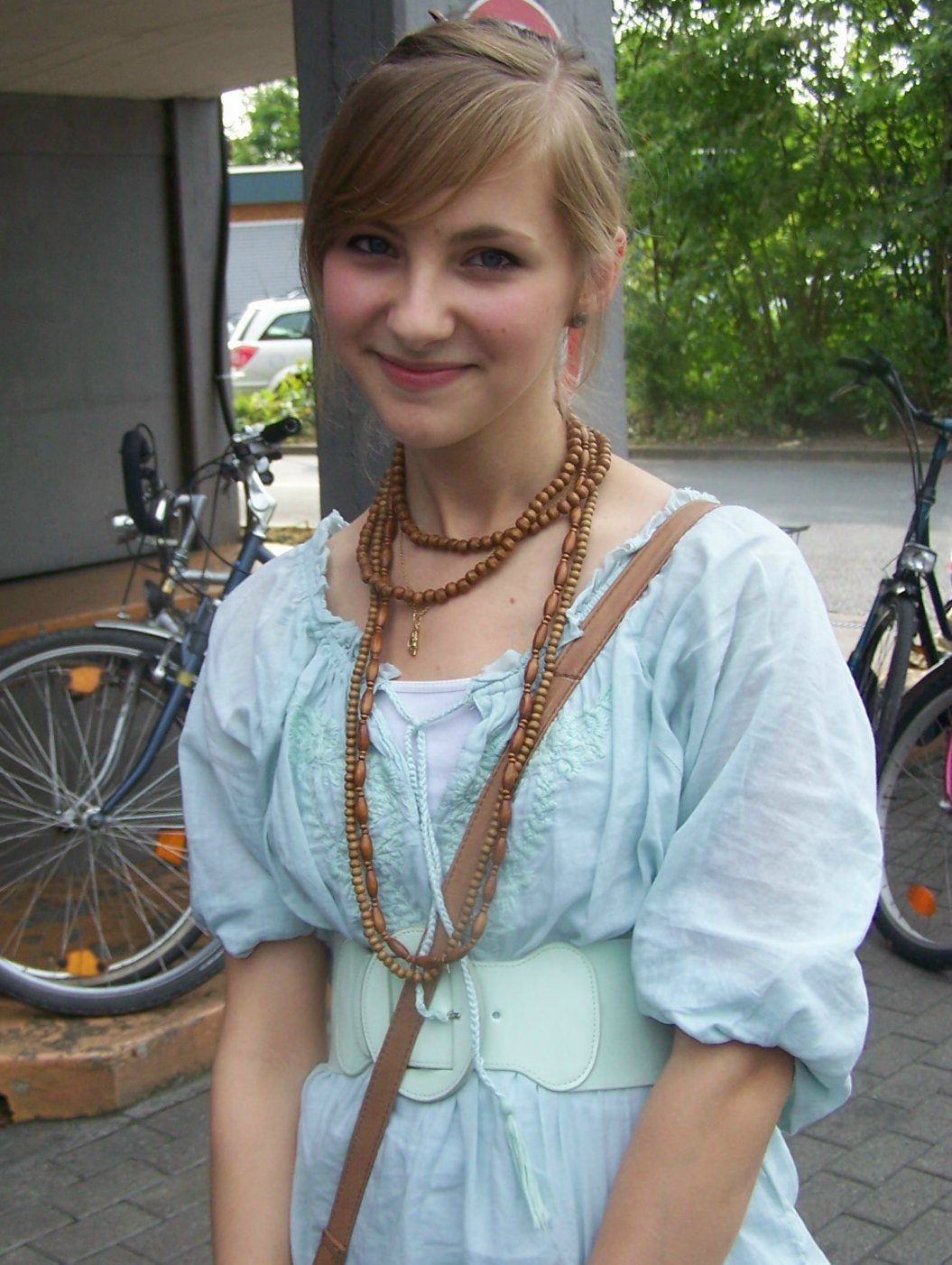 Auf dem Foto zu sehen ist Cynthia Cosima. Das Foto entstand am 28.06.2009 auf dem NRW-Tag in Hamm.